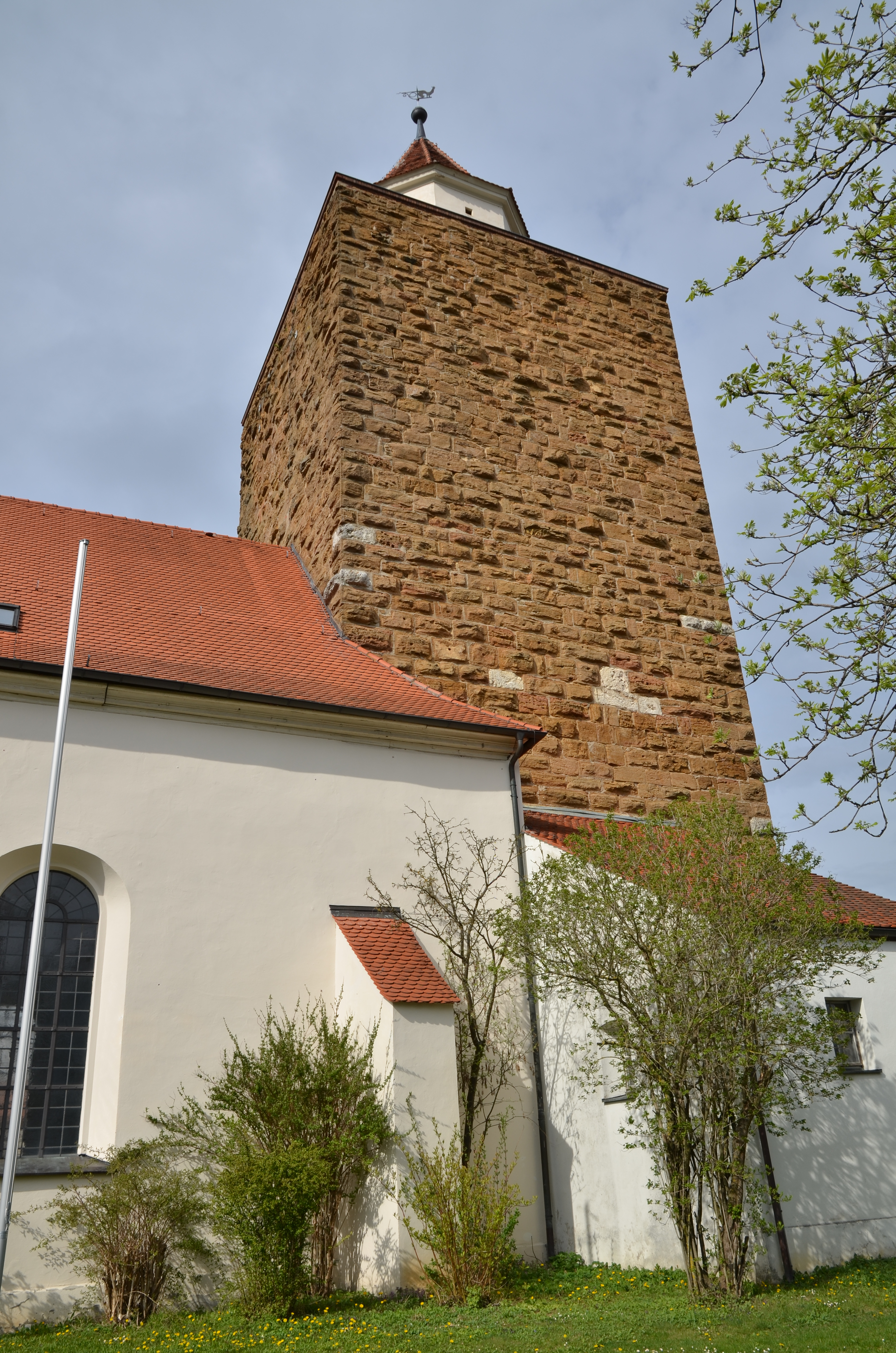 Evangelische Kirche